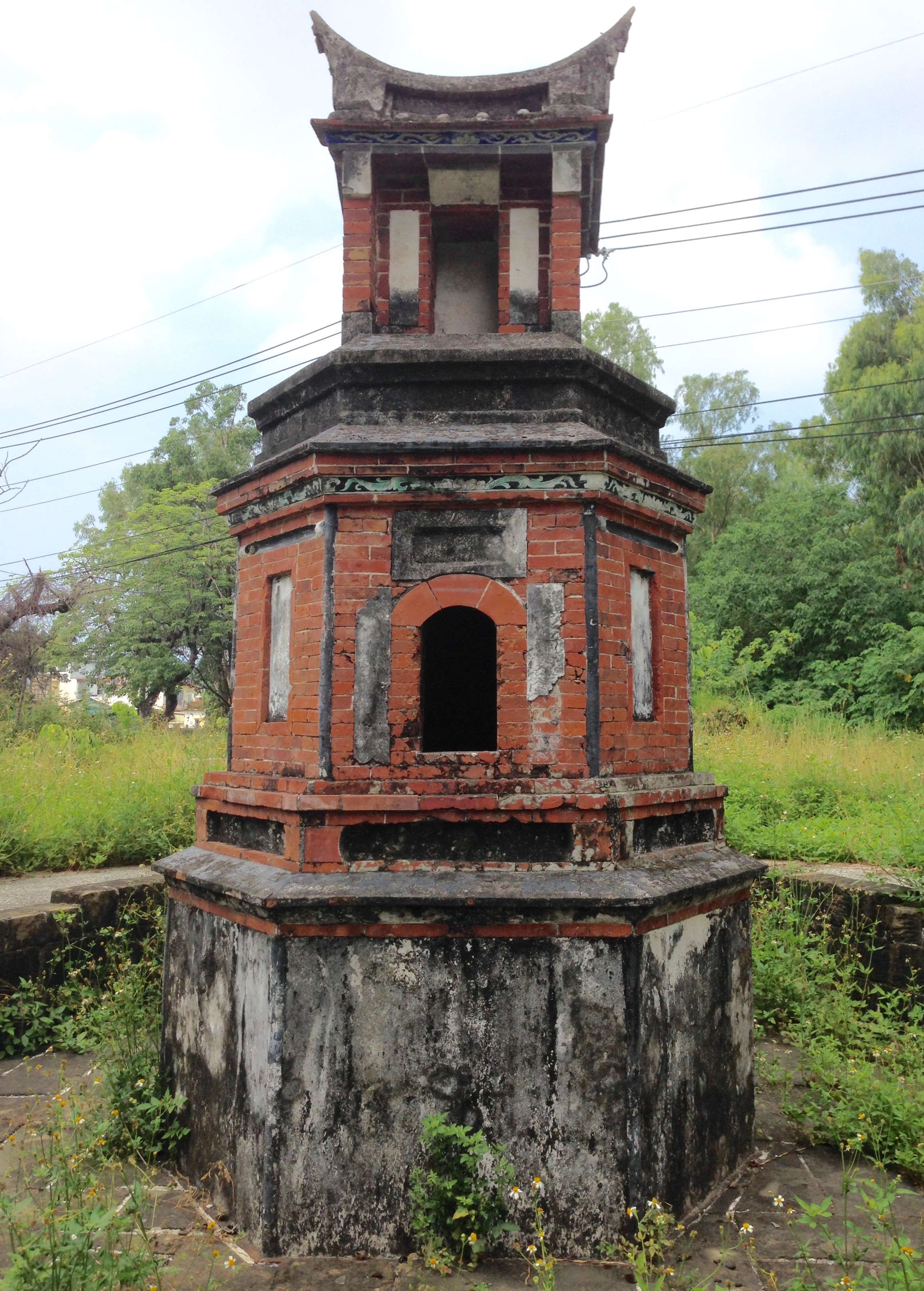 中文（台灣）: 石頭營聖蹟亭